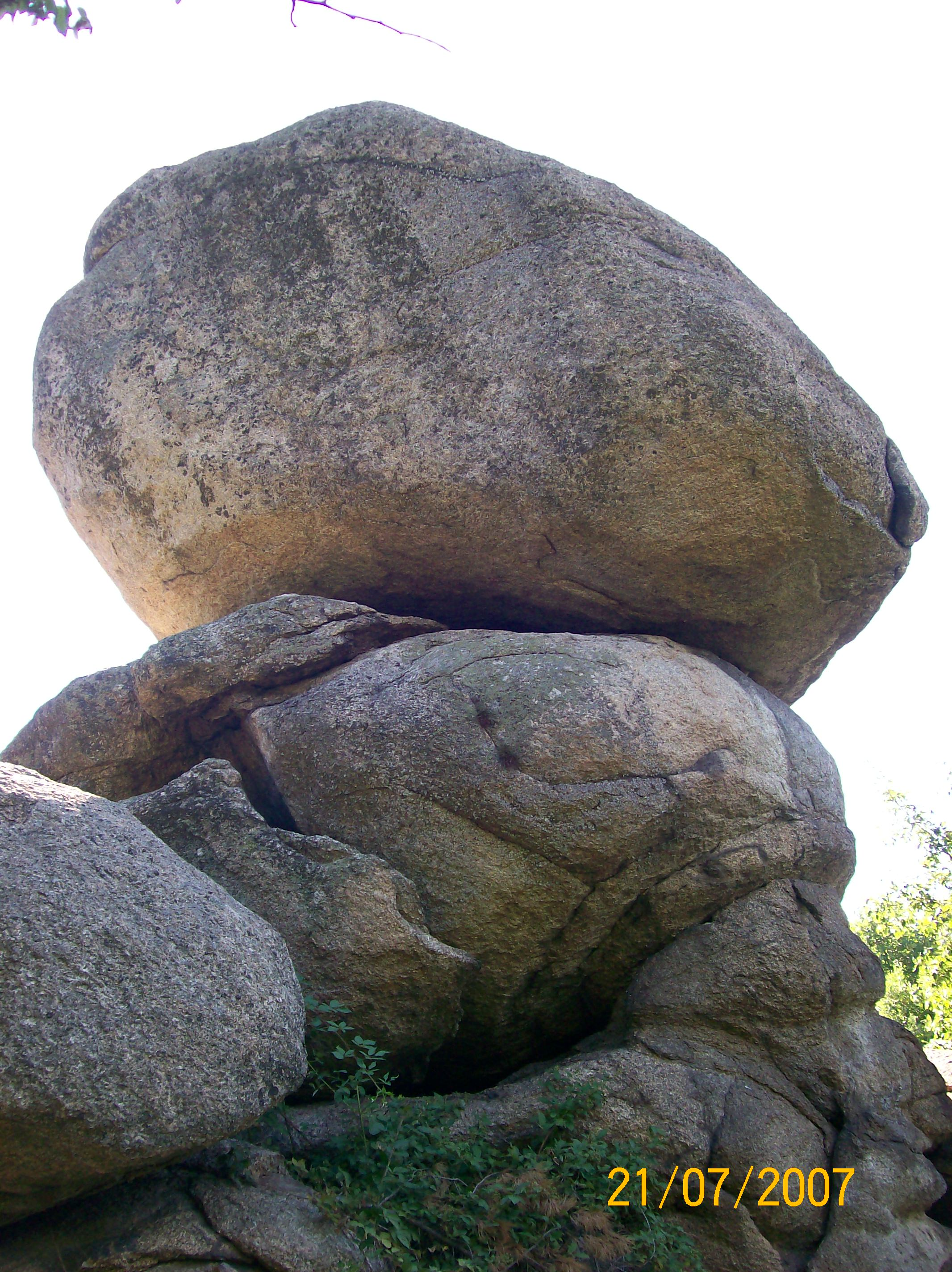 Булският камък, село Розино, област Пловдив